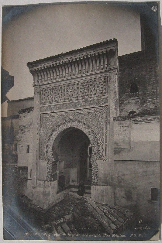 TLEMCEN - Portail de la Mosquée de Sidi Bou Médine